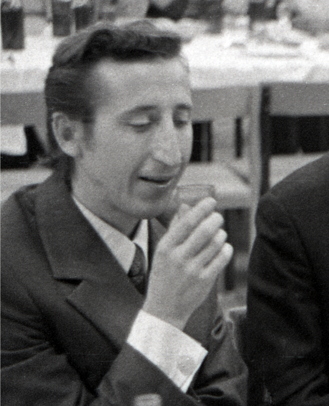 Vilius Šaduikis